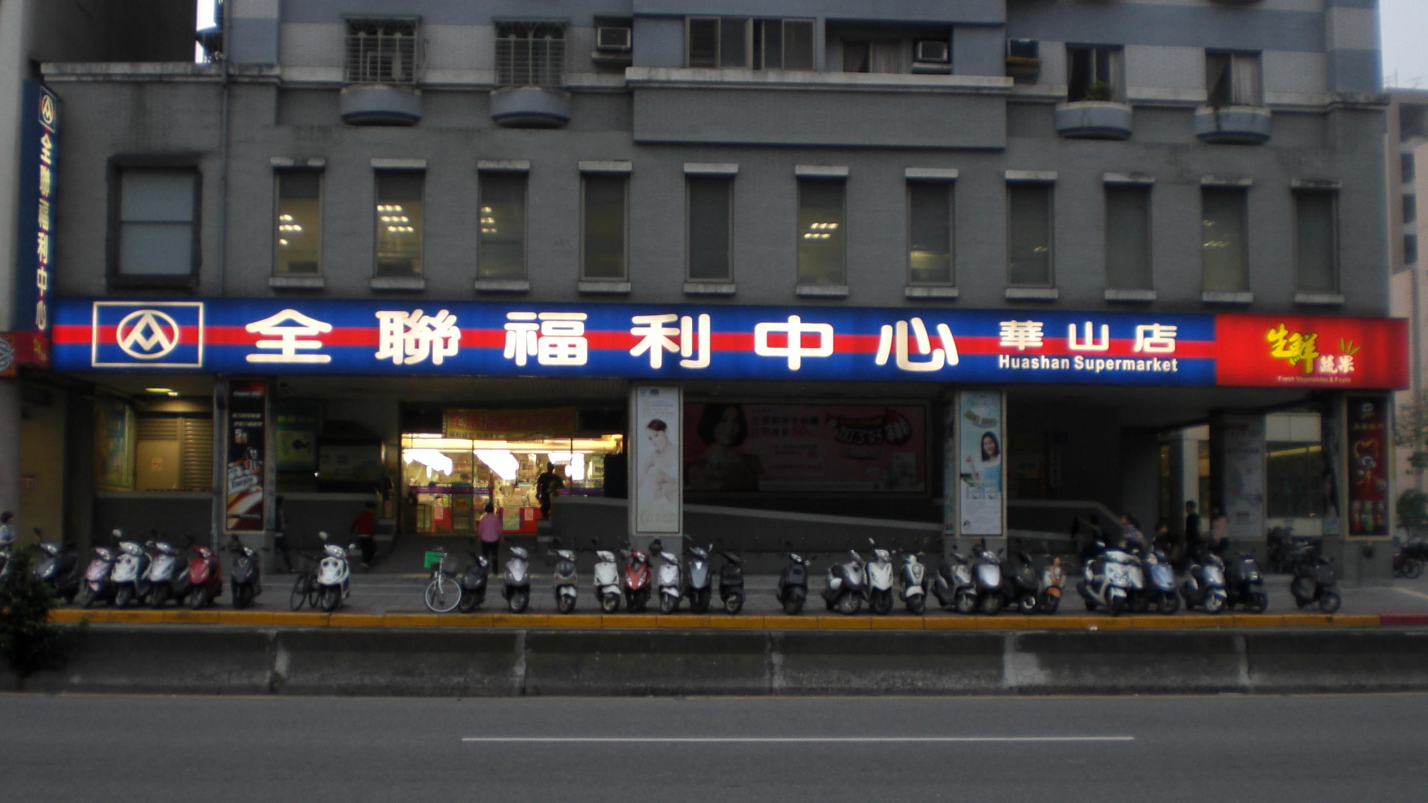 中文（台灣）: 全聯實業原總部位於臺北市中正區忠孝東路一段86號2樓（忠孝幸福大樓），樓下是全聯福利中心華山店。